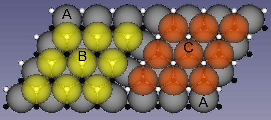 ABC-Schema der hexagonalen dichtesten Kugelpackung